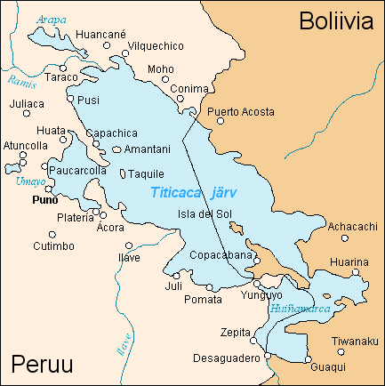 Tegemist on eesti keelde tõlgitud kaardiga. Originaalpilt on Image:Lake_Titicaca_map.png. This image is translated (into estonian language) version of image Image:Lake_Titicaca_map.png.